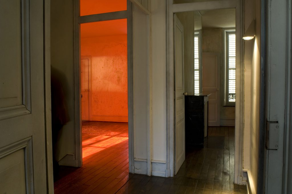 Intérieur de la maison des Ailleurs, Charleville-Mézières